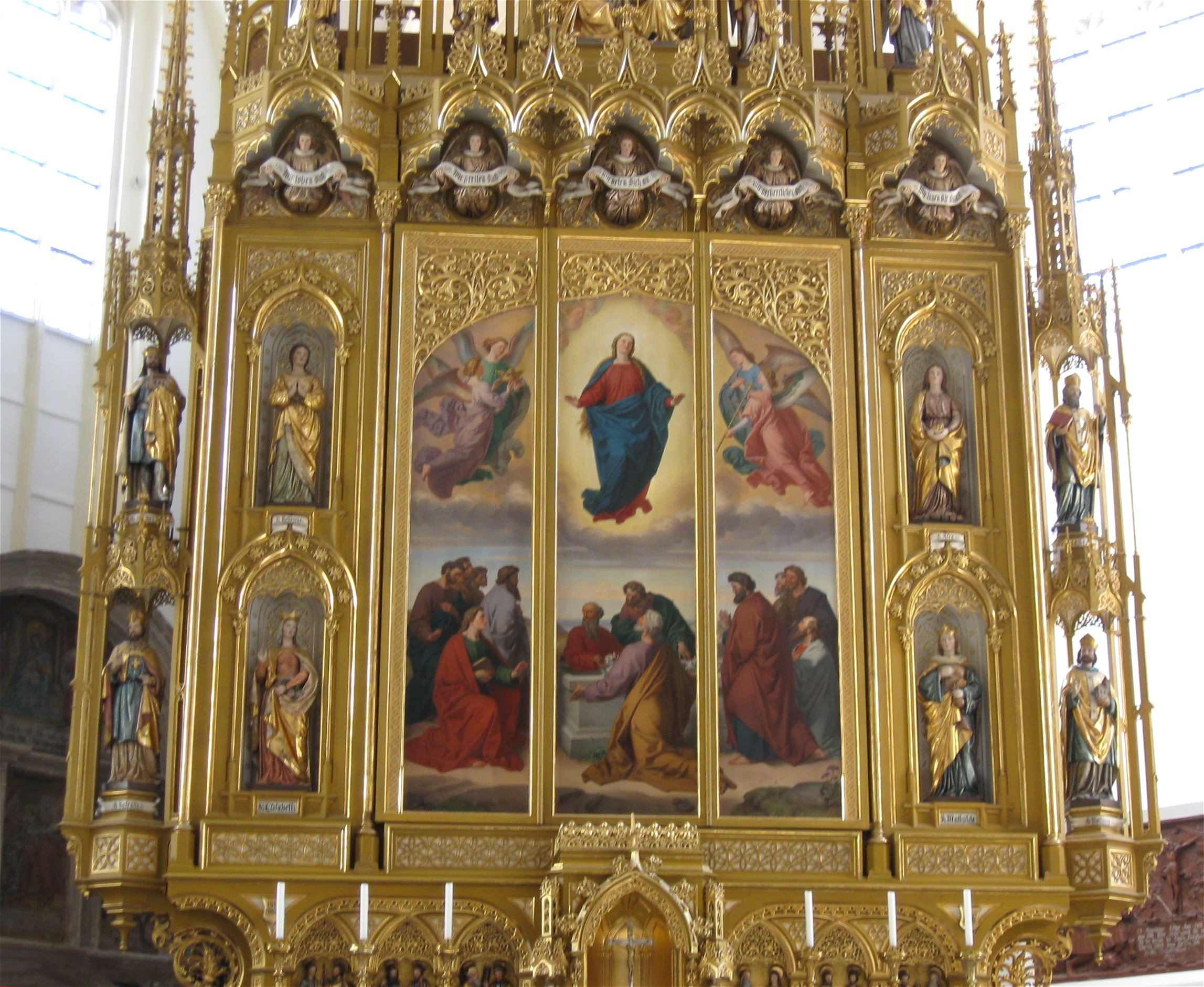 Kath. Stadtpfarrkirche Mariä Himmelfahrt, Hauptaltar; dreischiffige gotische Hallenkirche mit polygonalem Chorschluss und Westturm, 1453-90, 1612 umgestaltet, 1854-77 regotisiert, Turm 1875-77; mit Ausstattung, Bad Tölz